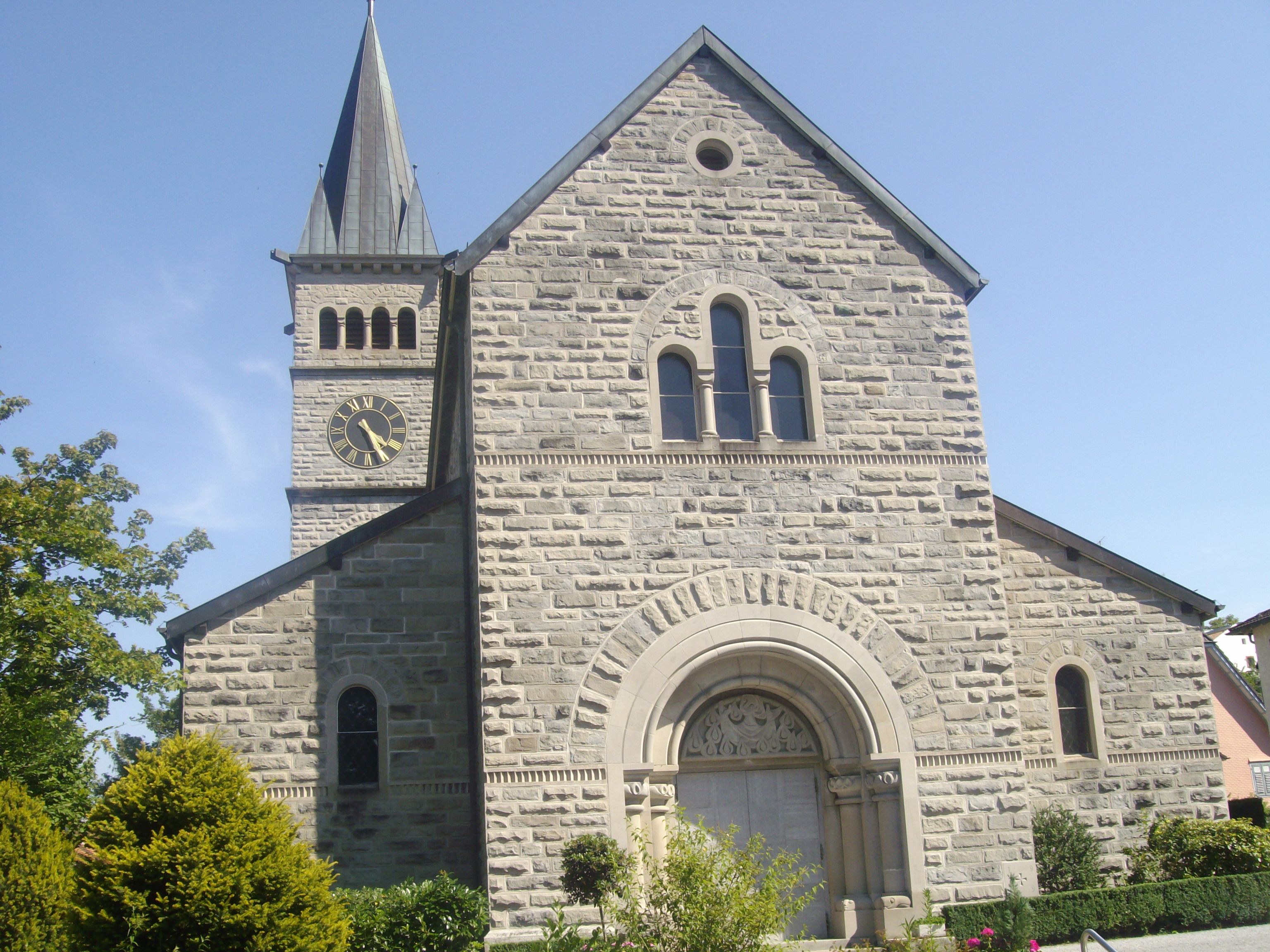 Äusseres der katholischen Pfarrkirche St. Marien, Wädenswil